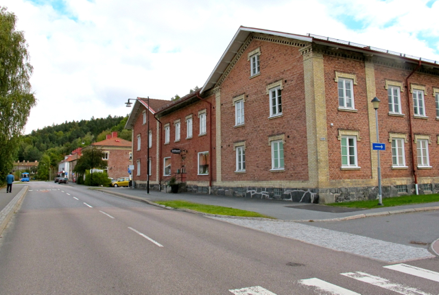 Jonsered september 2013